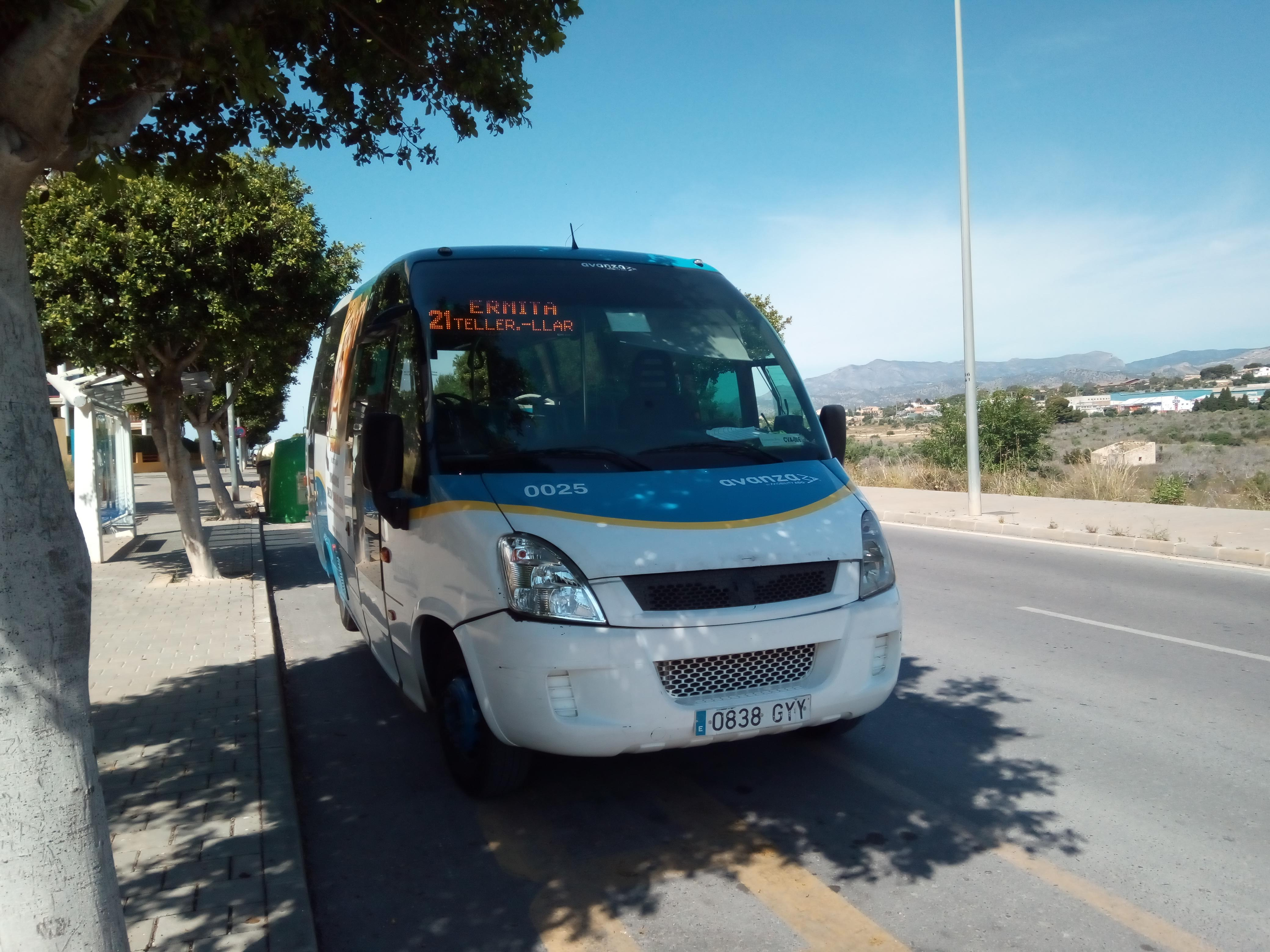 Aqui vemos un microbus Iveco Daily Irisbus. realizando un servicio en la linea 21 de la Guagua de Villajoyosa.